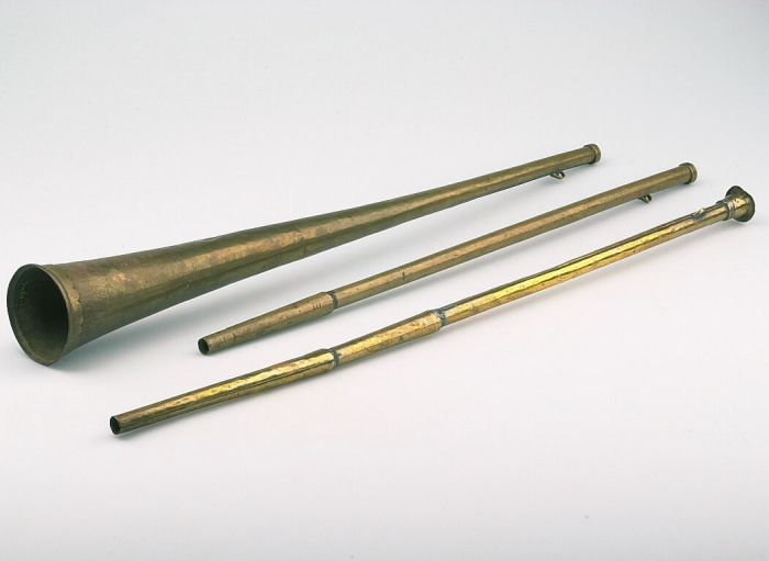 Deze natuurlijke hoorn van messing bestaat uit drie in elkaar schuivende delen, en wordt toppelings geblazen. Het geluid wordt geproduceerd door de vibraties van de lippen van de speler. De hoorn (nafir) wordt vooral geassocieerd met de islamitische vastenmaand Ramadan. In Marokko wordt traditioneel het onderbreken van de vastendag (al-iftar) precies na het vijfde en laatste gebed bij zonsondergang, door het blazen op de hoorn aangekondigd. Op dezelfde wijze worden de mensen 's ochtends vroeg weer wakker gemaakt voor de sahoer-maaltijd, de laatste maaltijd voor zonsopgang. De speler (neffar) trekt elke avond gedurende Ramadan door de wijk met zijn hoorn. Zijn dienst wordt pas aan het eind van de maand beloond met de zakat-al-iftar, een liefdadigheidsgave bij het einde van de vastenmaand Ramadan. Dit gebruik vindt men alleen in de stad, en vooral in de oude gedeelte (de medina) en de volkswijken. Op het platteland bestaat het gebruik niet. De functie van dit instrument houdt niet op bij deze rituele handeling. Het wordt ook als muziekinstrument bespeeld door diverse volksmuziekgroepen, zoals bijvoorbeeld de Daqqa Marrakshiyya uit Marrakech, of tijdens gemeenschaps- en privéfeesten, zoals bruiloften en besnijdenissen.